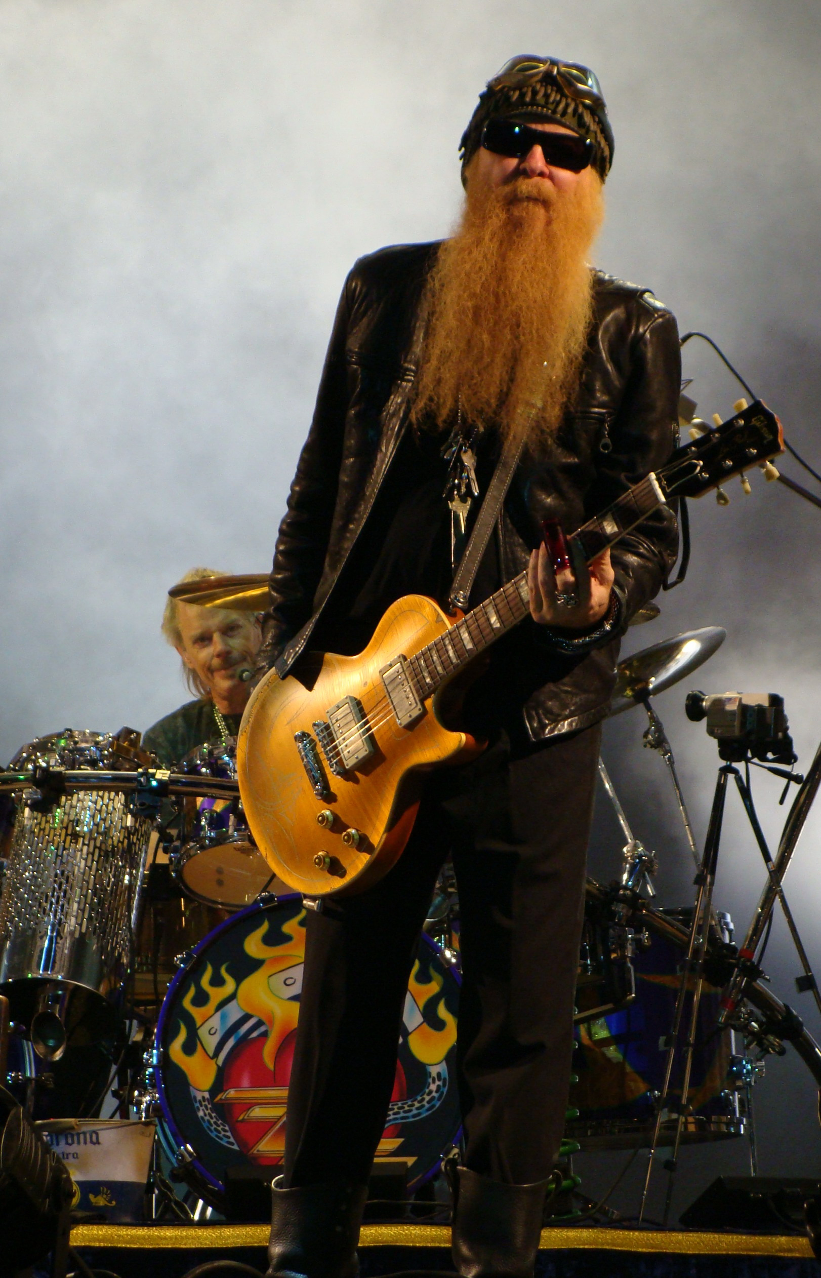 Billy Gibbons y Frank Beard en un concierto de ZZ Top en el Bilbao BBK Live 2008.